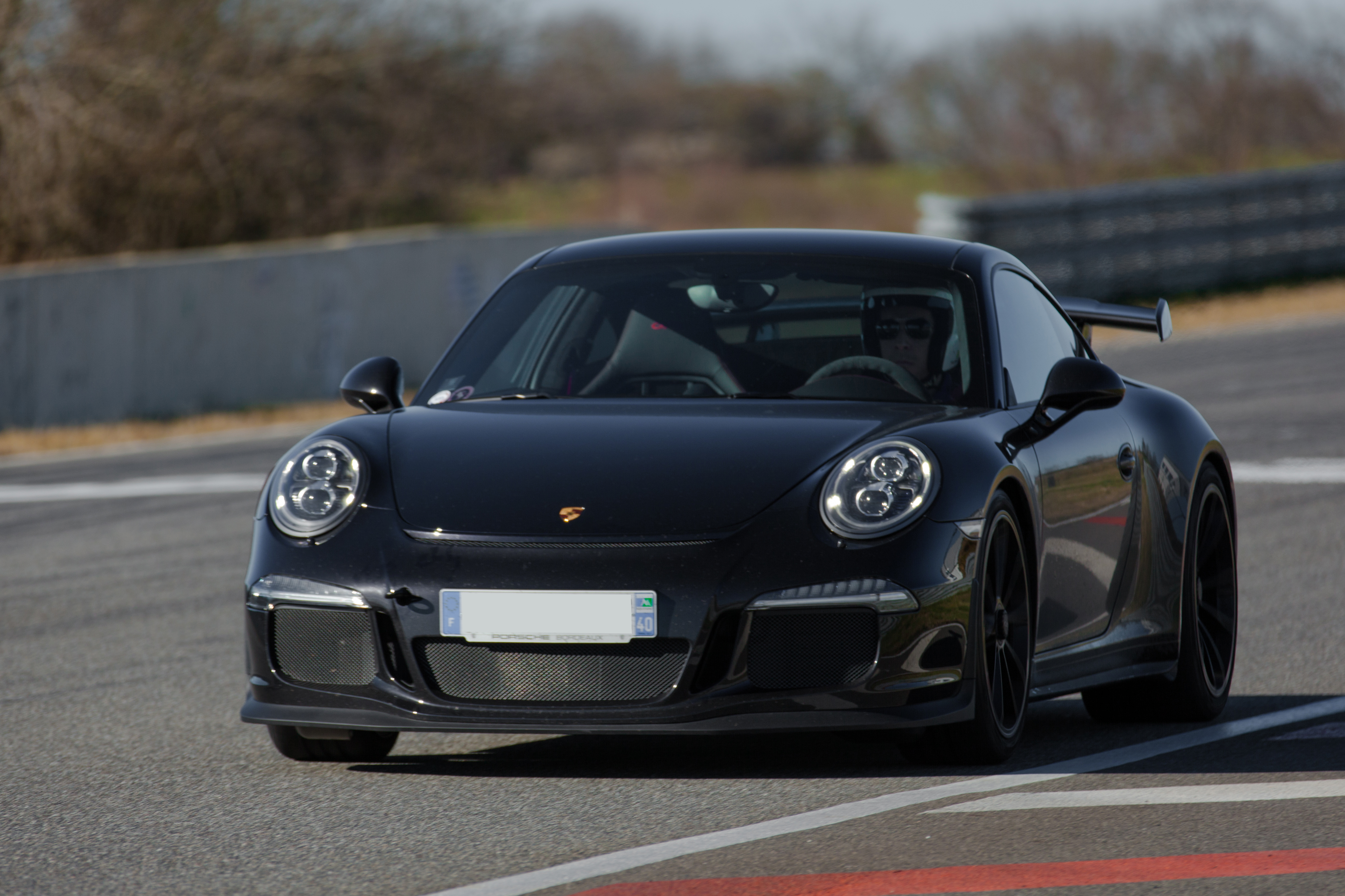 Black Porsche 911 GT3 - Club ASA - Circuit Pau-Arnos